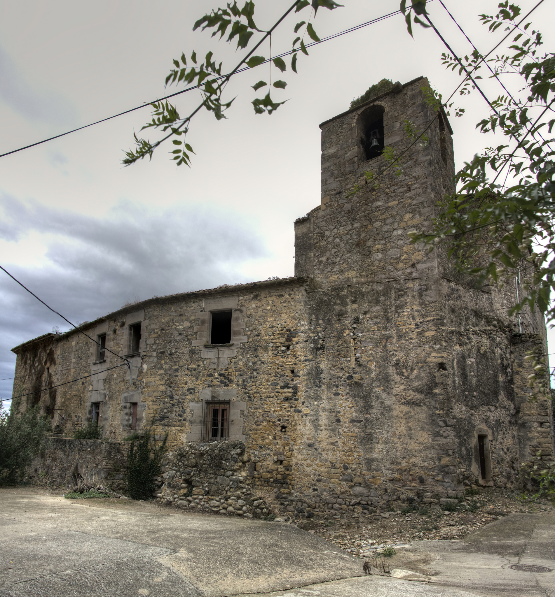 Castell d'Arenys d'Empordà, al municipi de Garrigàs, adossat a l'església.